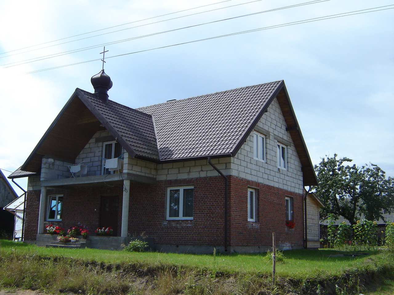 Żenski klasztor prawosławny w Zaleszanach.